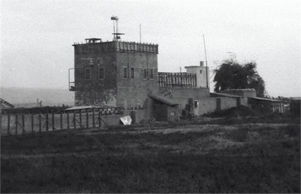 טירת צבי - מראה